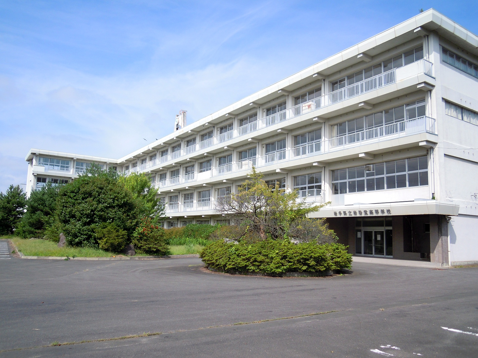 岩手県奥州市江刺区館山にある岩手県立岩谷堂高校の統合前旧校舎